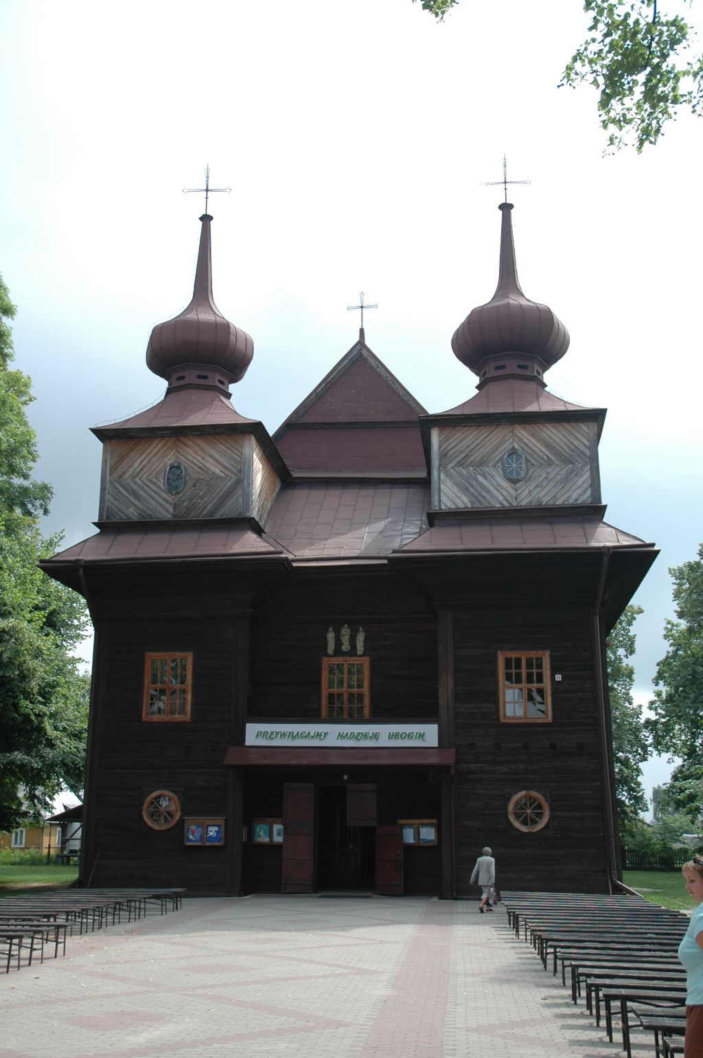 Poland, Tomaszów Lubelski - wooden church.